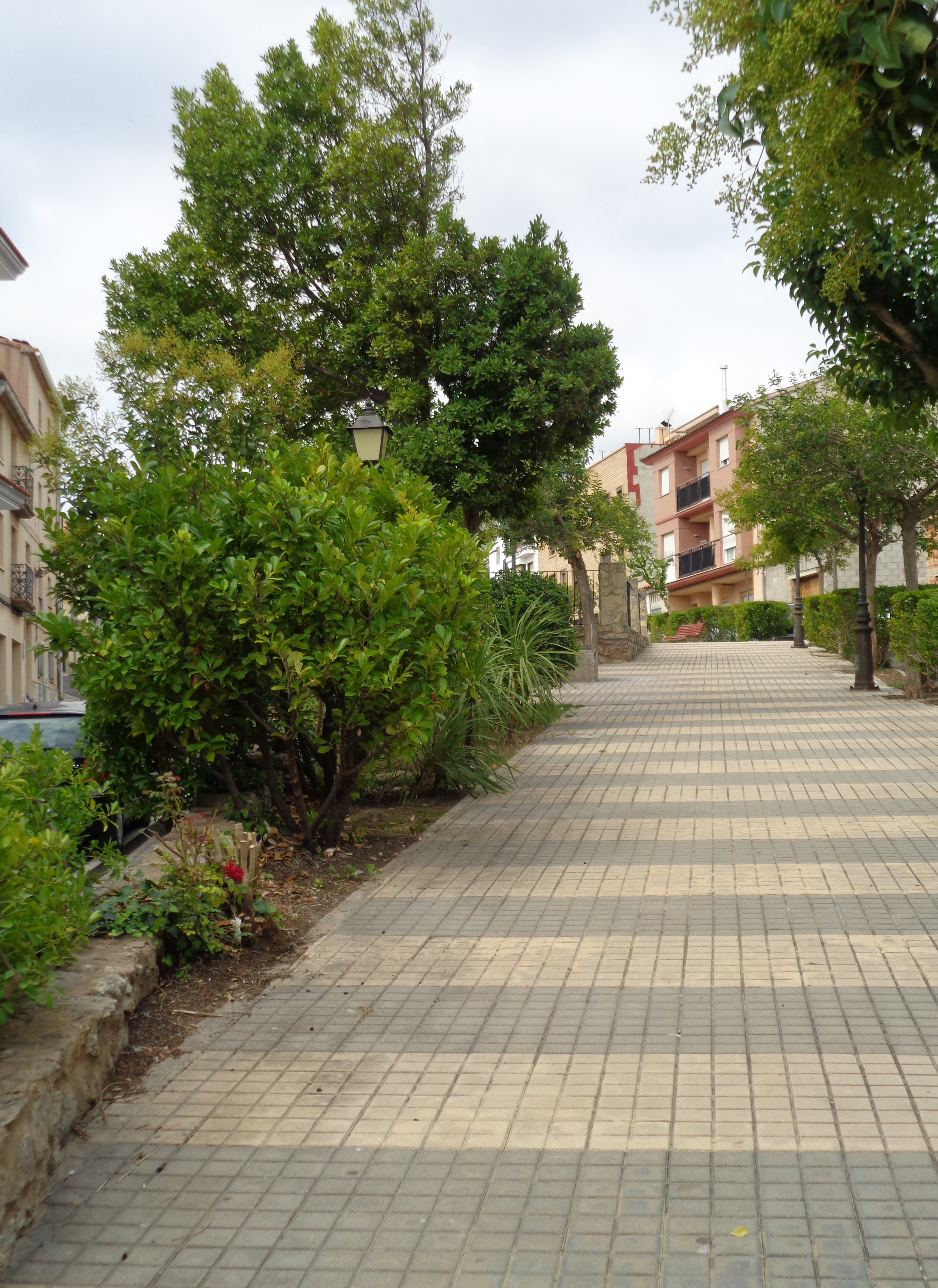 Begís.